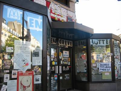 Description: Photo du McDo de Strasbourg-St Denis, à Paris, en grève. Source: user:Popolon en ballade avec son appareil photo Licence: GNU FDL user:Popolon Catégorie:McDonald's